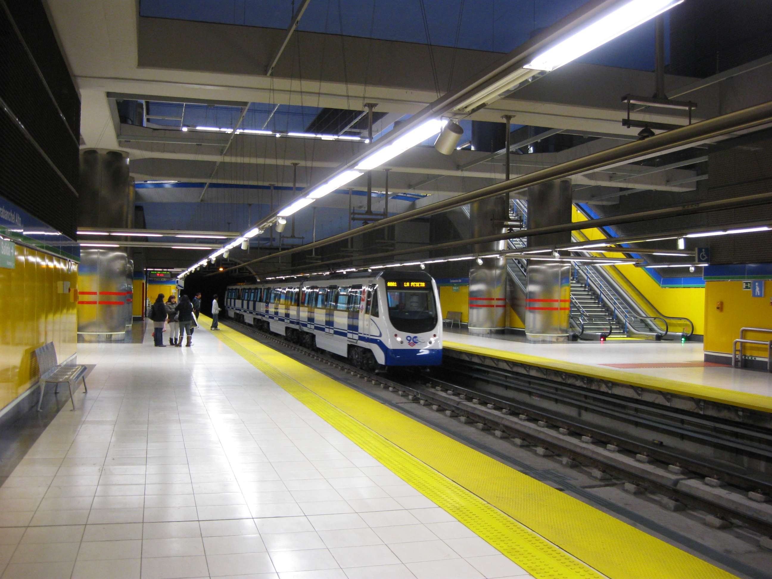 Rame de la ligne 11 du Metro de Madrid entrant dans la station Carabanchel Alto.